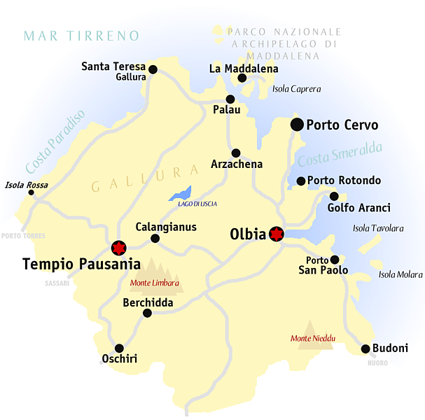 Kaart van de provincie Olbia-Tempio